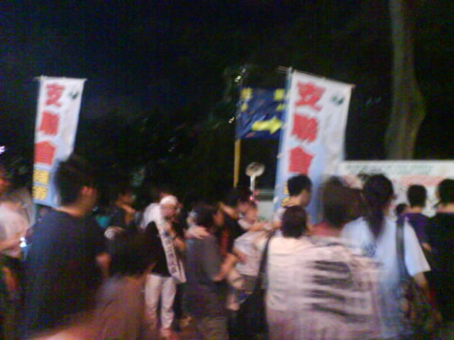 六四18週年